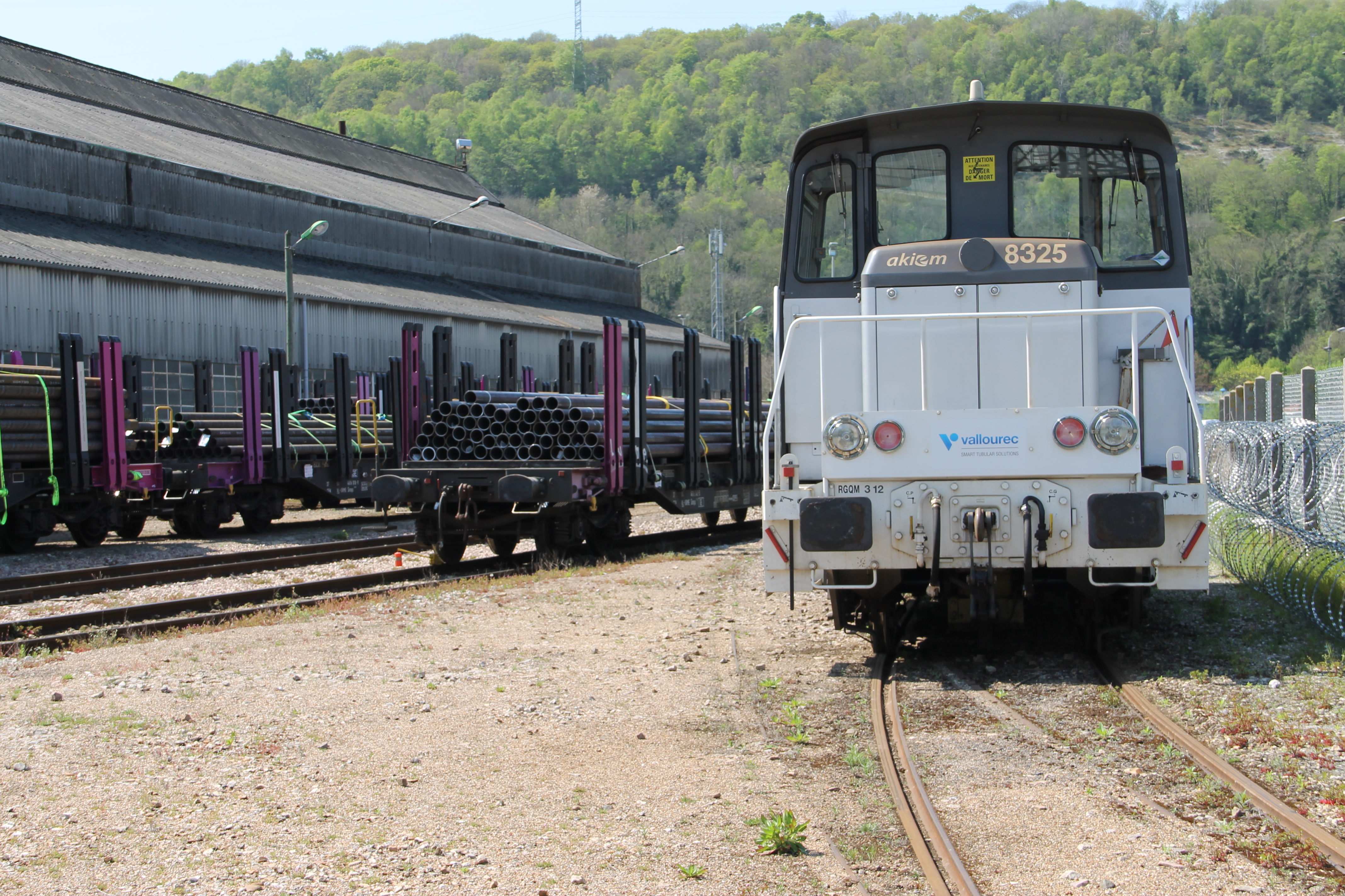 Locotracteur Akiem sur le site Vallourec de Déville-lès-Rouen